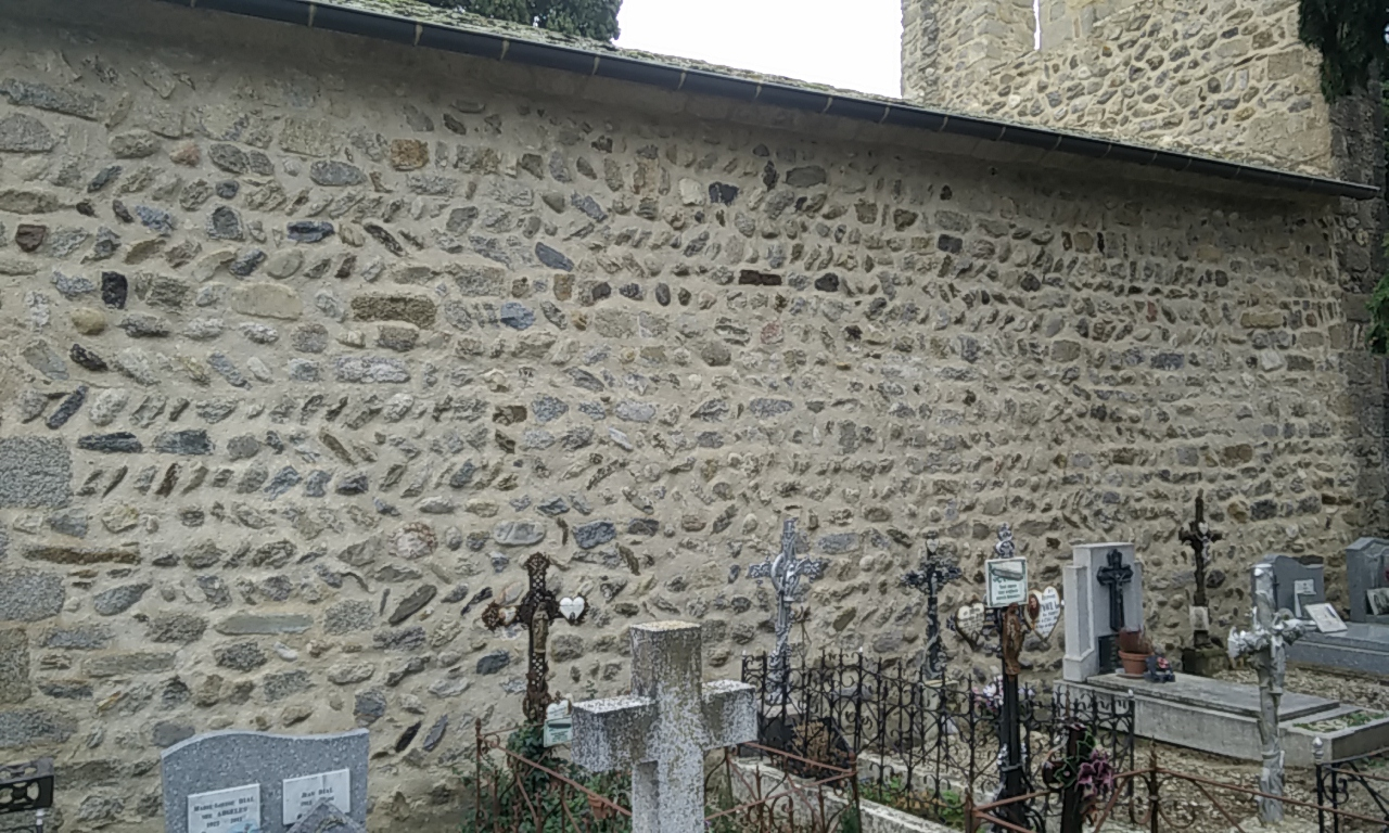 Façana septentrional de Sant Vicenç d'Eus (església vella), amb "opus spicattum".